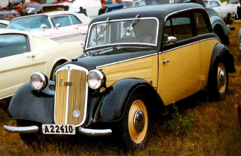 DKW Limousine